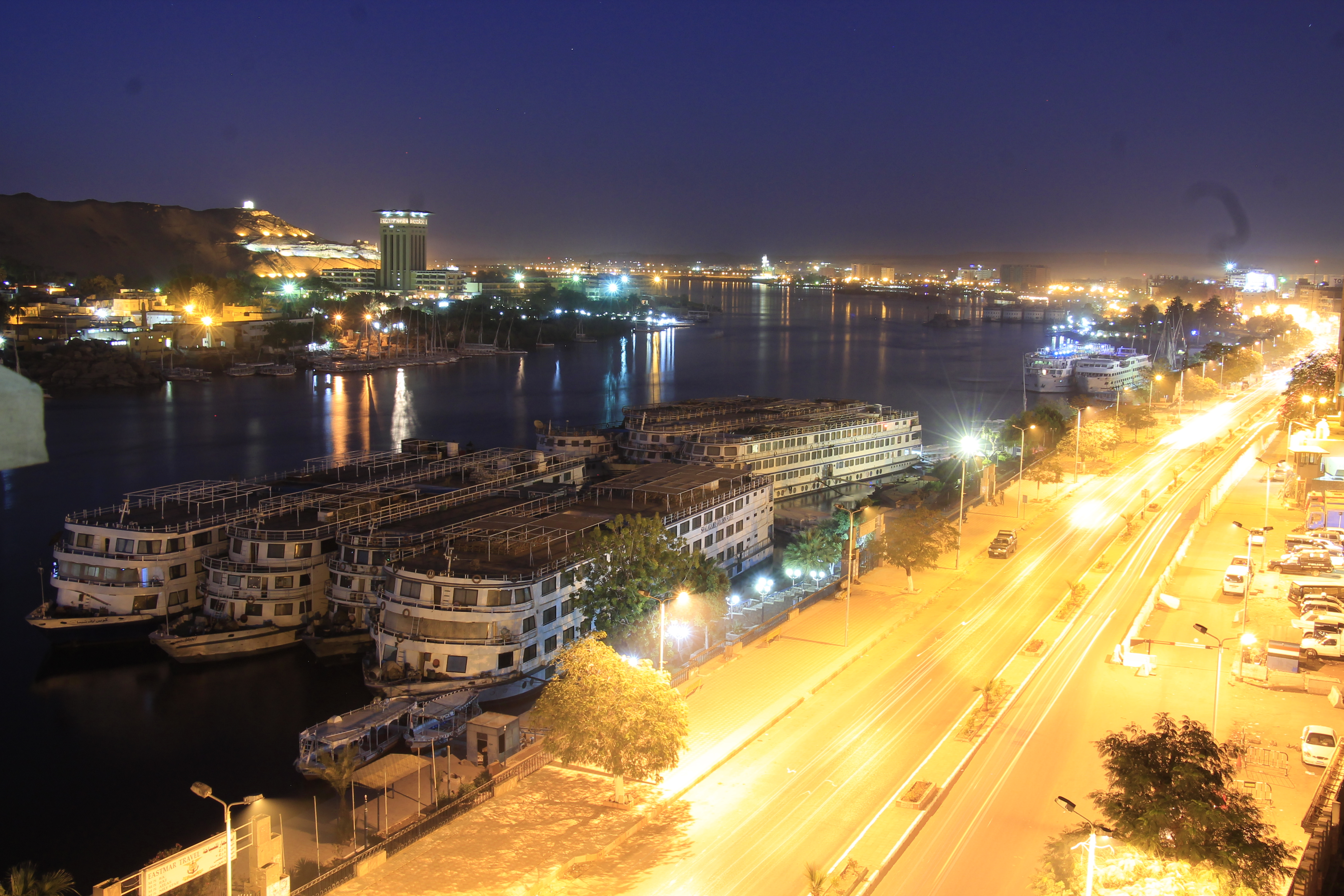 الأقصر تلقب بمدينة المائة باب أو مدينة الشمس، عُرفت سابقاً باسم طيبة، هي عاصمة مصر في العصر الفرعوني، تقع على ضفاف نهر النيل والذي يقسمها إلى شطرين